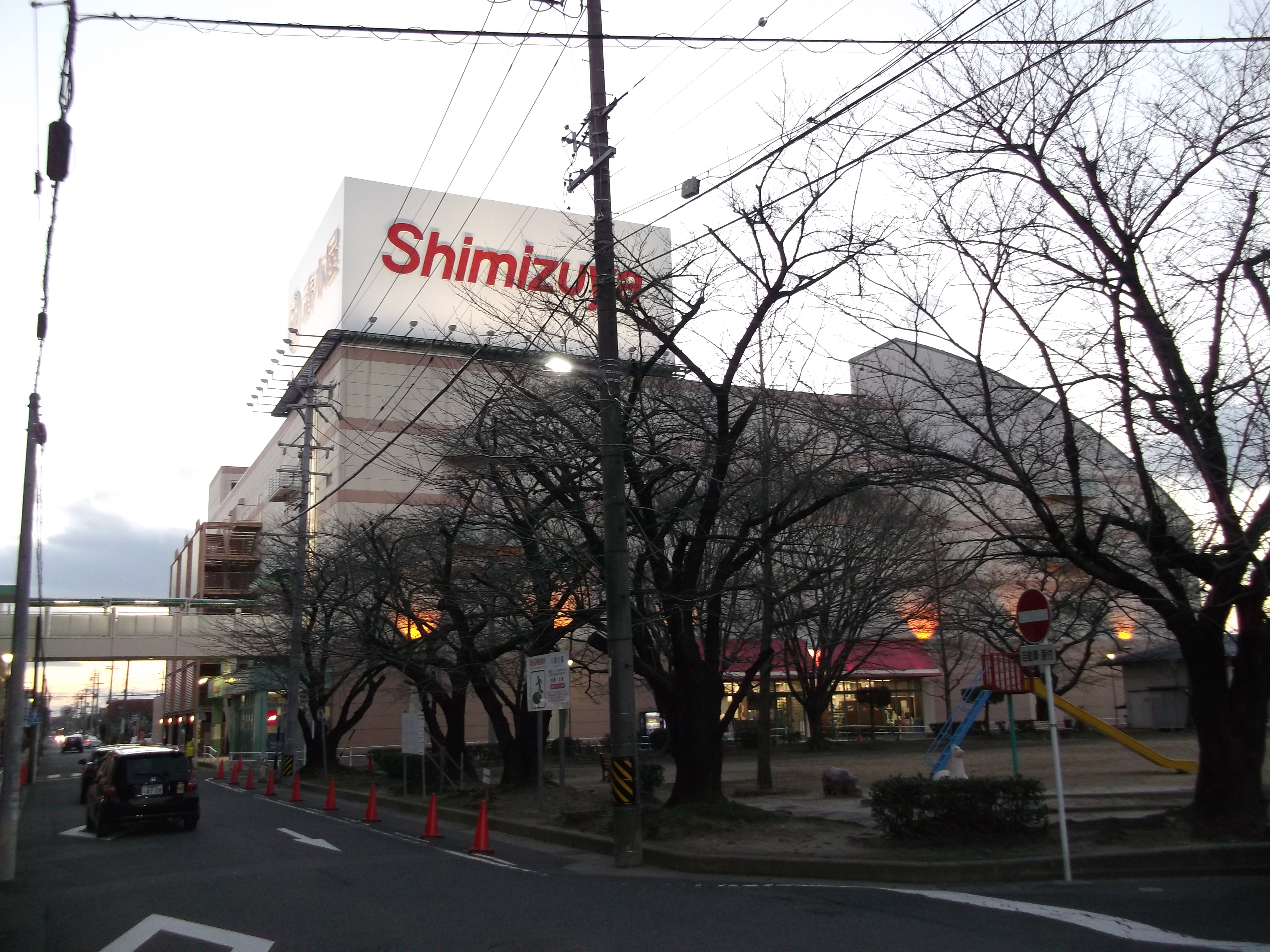 愛知県春日井市瑞穂通の清水屋本店を公園側より写す